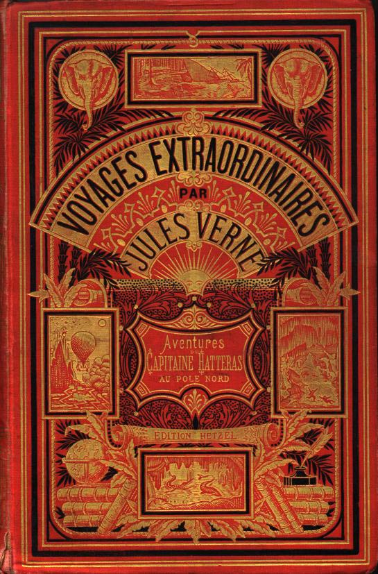 Couverture Voyages Extraordinaires par Jules Verne. Aventures du Capitaine Hatteras au pôle nord. Editions Hetzel.